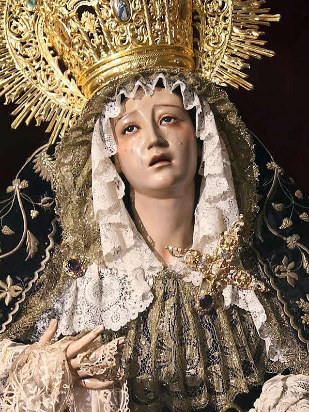 Nuestra Señora del Mayor Dolor